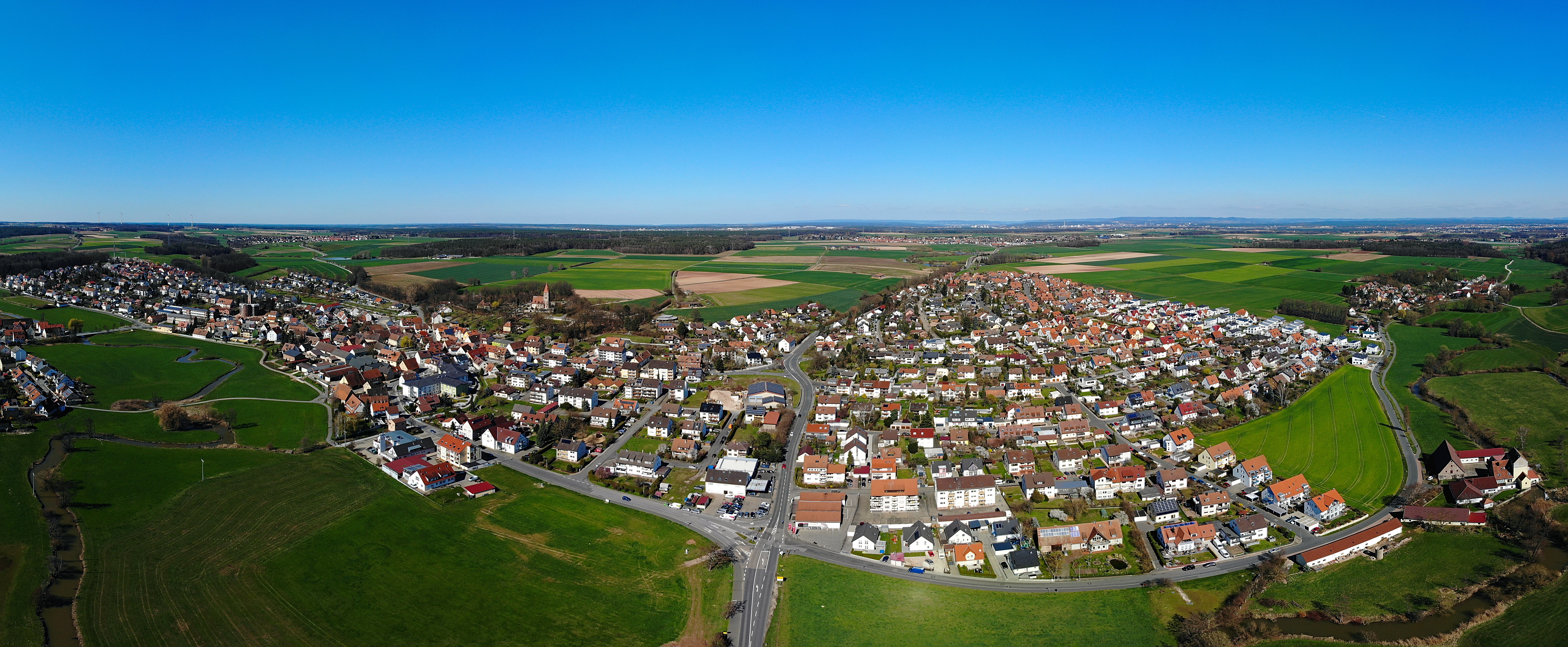 Veitsbronn Panorama Luftaufnahme (2020)